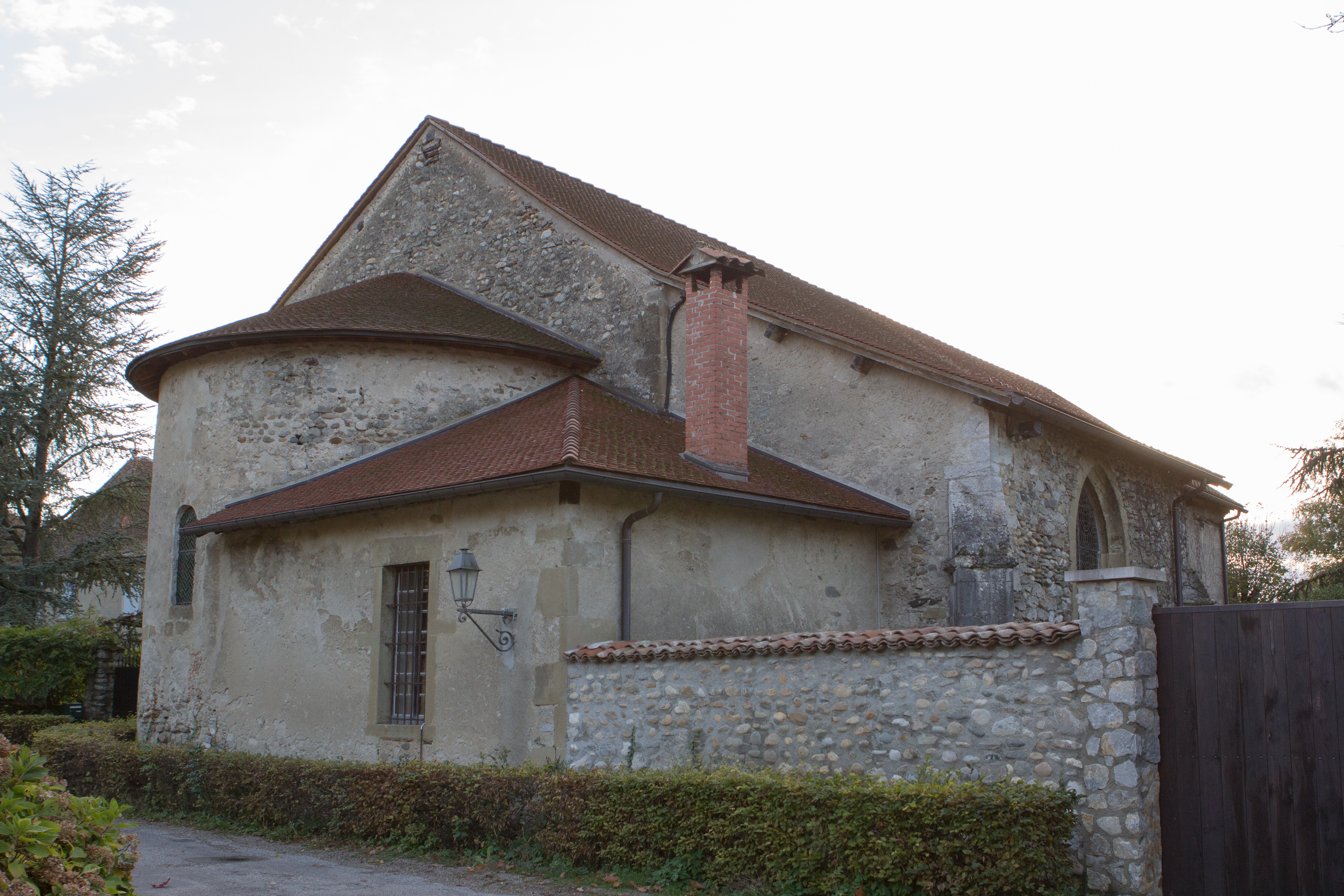 Prieuré de Chirens / Chirens, Isère, France